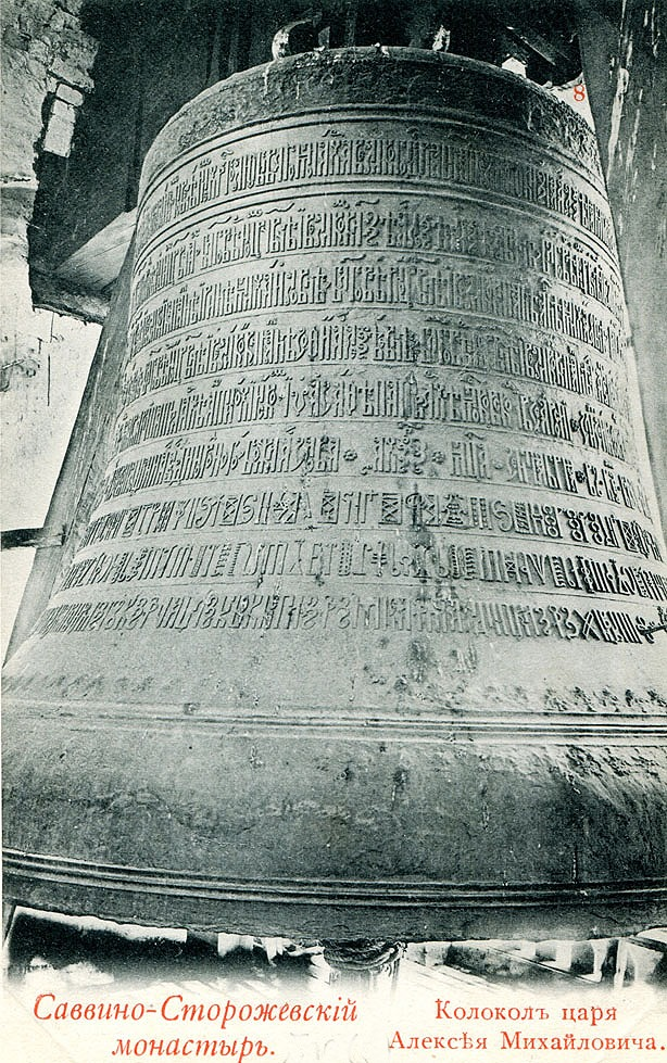 Колокол царя Алексея Михзайловича в Саввино-Сторожевском монастыре